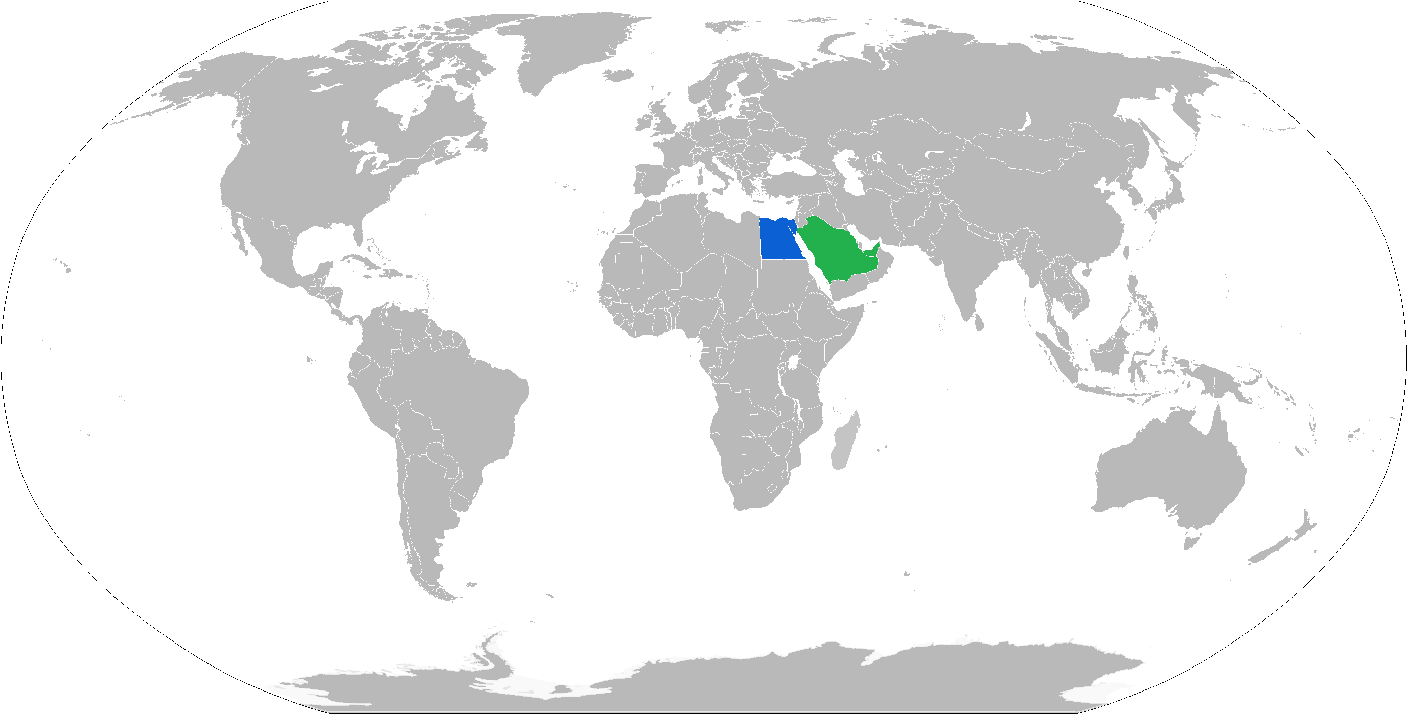 ST-100 operators